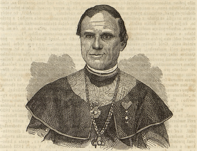 Jozef Kozáček - slovenský rímskokatolícky kňaz a kultúrny pracovník